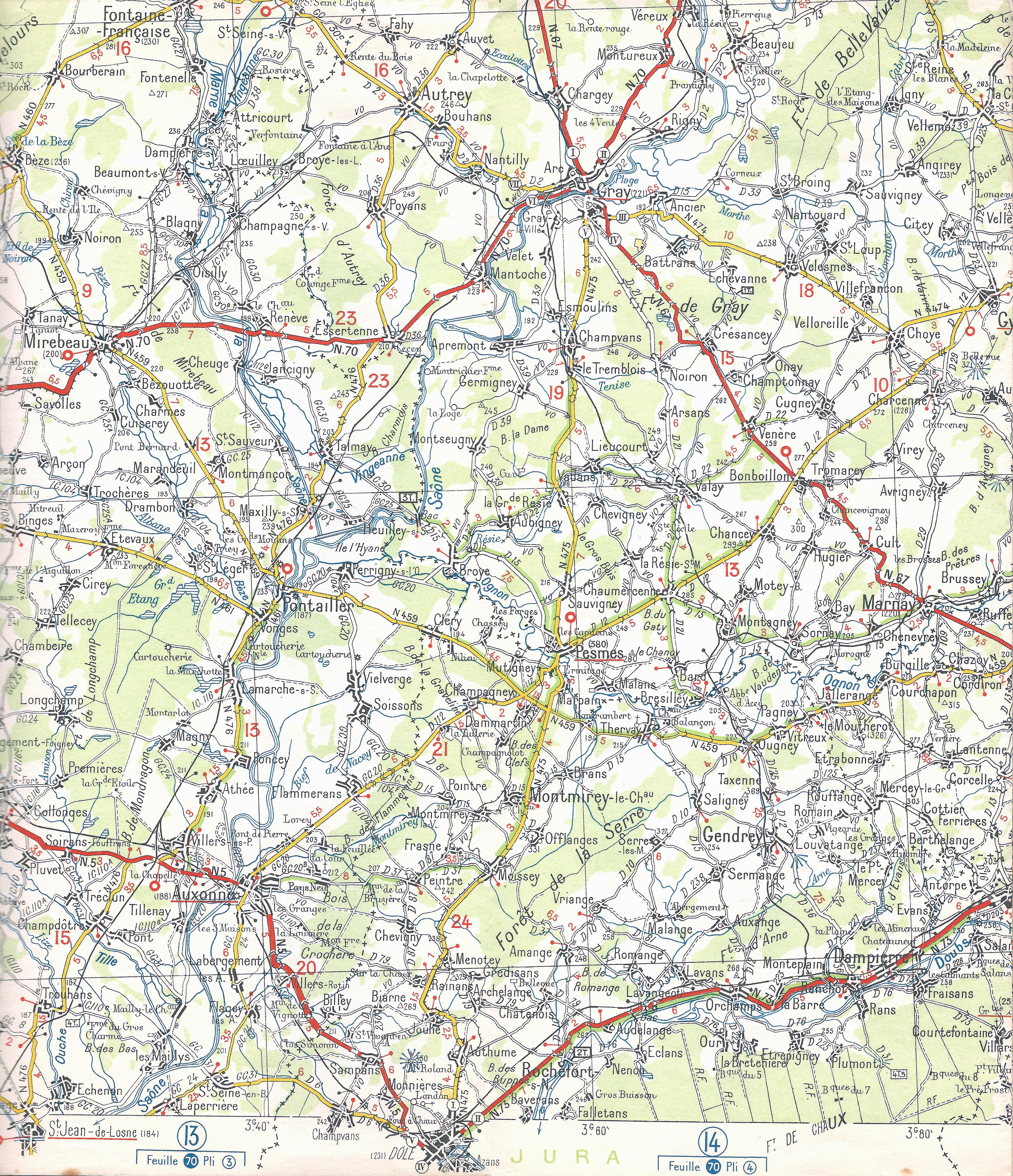 Deel (Cray Dole) van Michelin kaart nr 66 Frankrijk) uitgegeven in 1940. Dit moet voor de Duitse inval van 10 mei 1940 verkocht zijn. Buurtspoorlijn Dole - Pesmes is nog te zien, hoewel deze al in 1933 is opgeheven. Eveneens te zien is de lijn Dijon - Fontaine-Francaise.